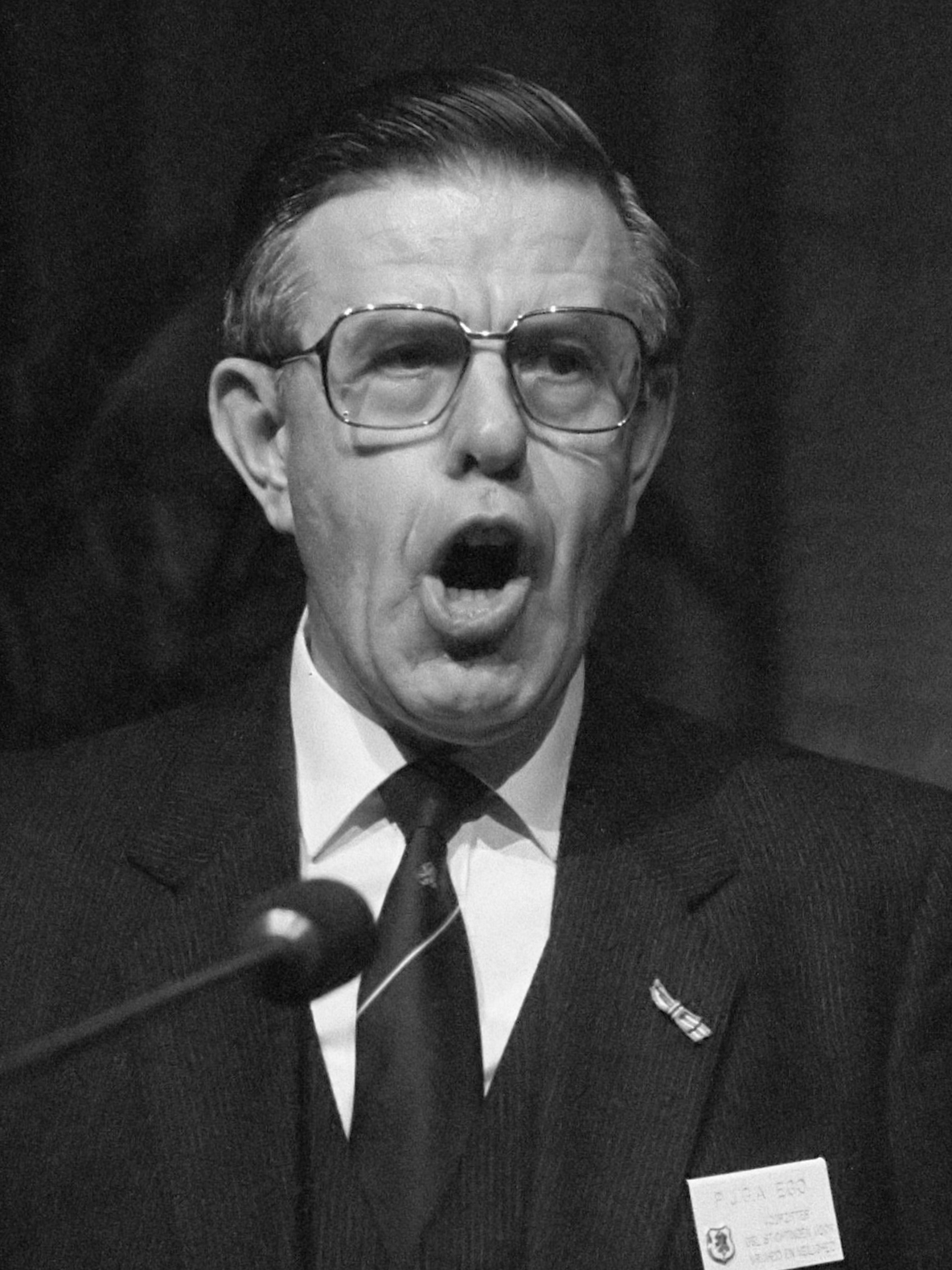 OSL-congres in Den Haag; voorzitter Prosper Ego 4 oktober 1986